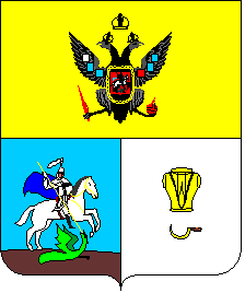 Імперський герб Світловодська. Затверджений 6 квітня 1845р. На горiшнiй половинi перетятого щита в золотому полi Державний Росiйський герб; на долiшнiй, роздiленiй на двi частини, на першiй на лазуровому полi Св.Великомученик i Побiдоносець Георгiй, на другiй на срiбному полi золотий кiрас i серп. Комп'ютерна графіка - В.М.Напиткін.